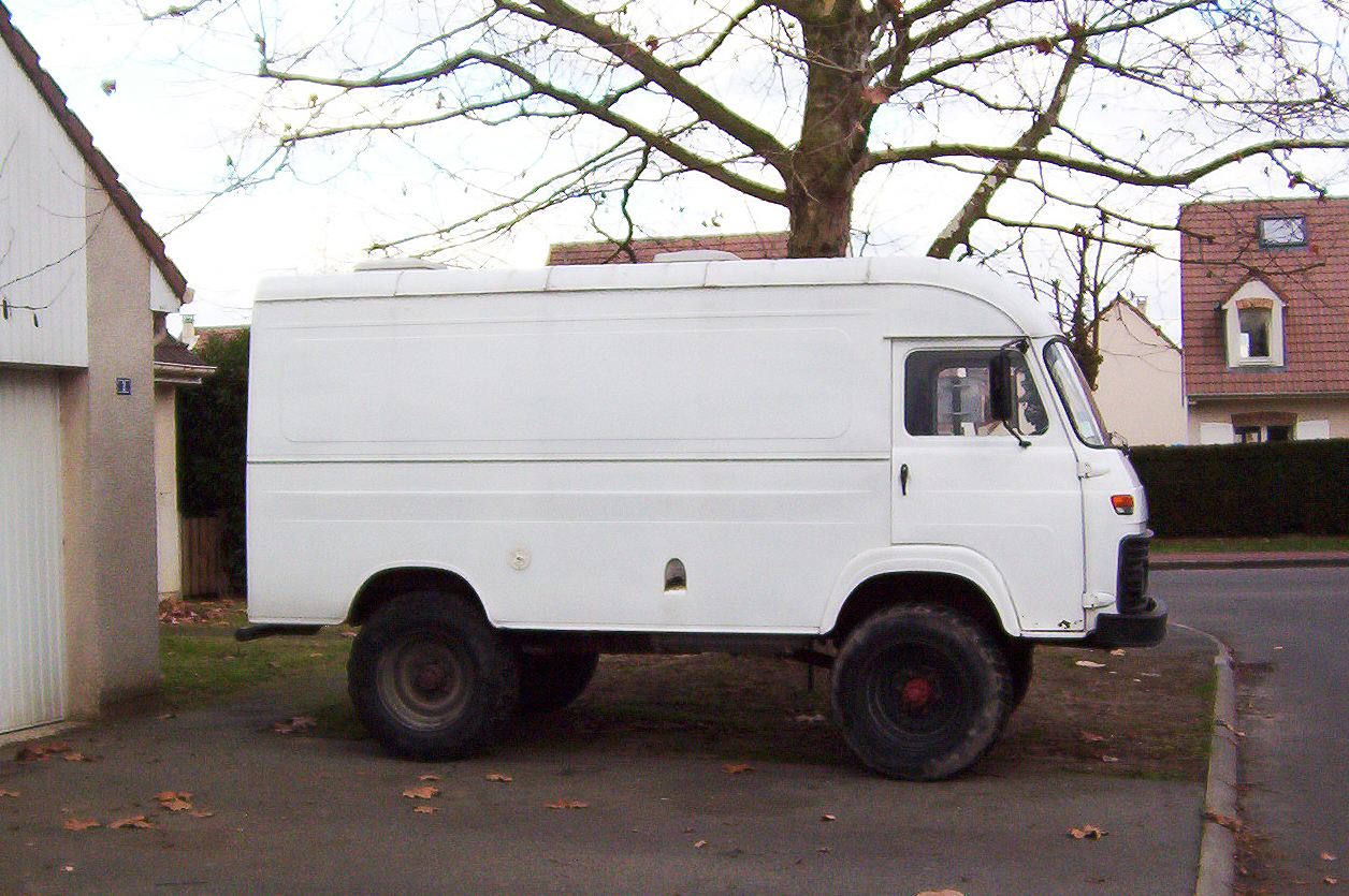 Le celèbre utilitaire SAVIEM version pneus larges (4x4)